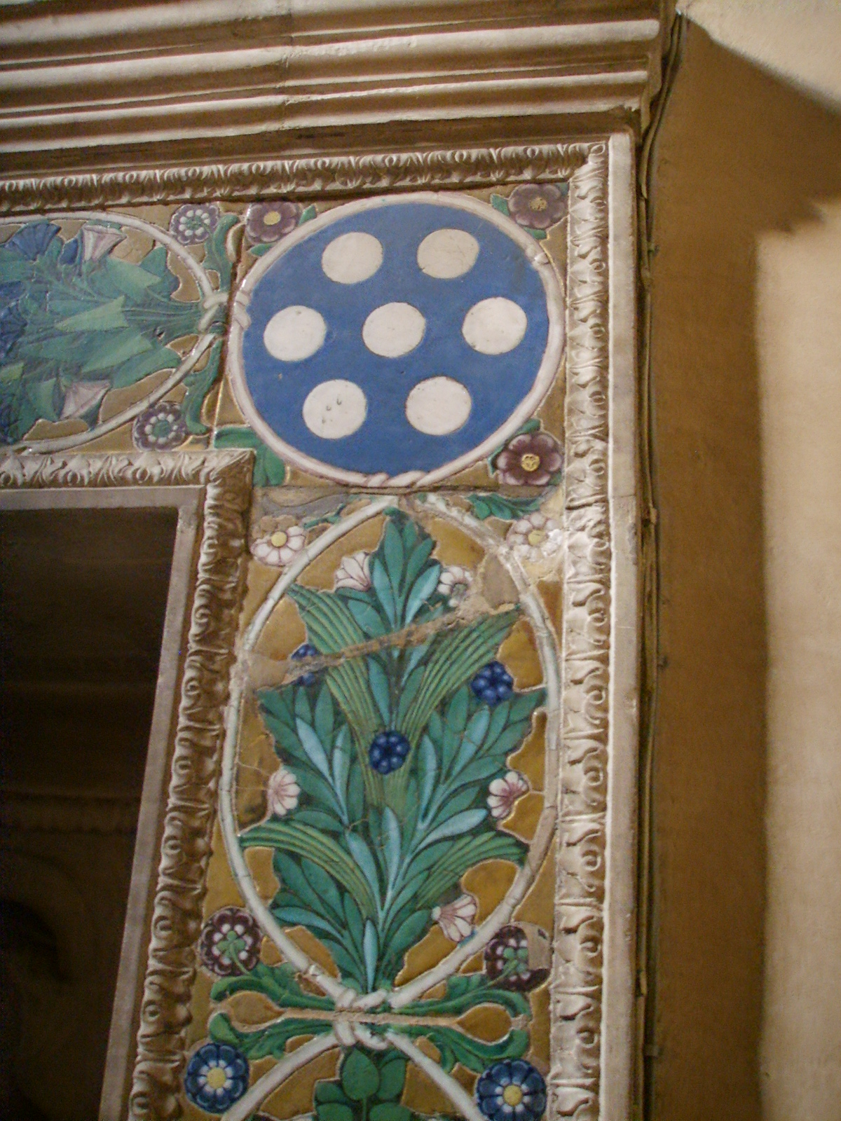 Santa trinita, luca della robbia, monumento funebre a Benozzo Federighi, cornice